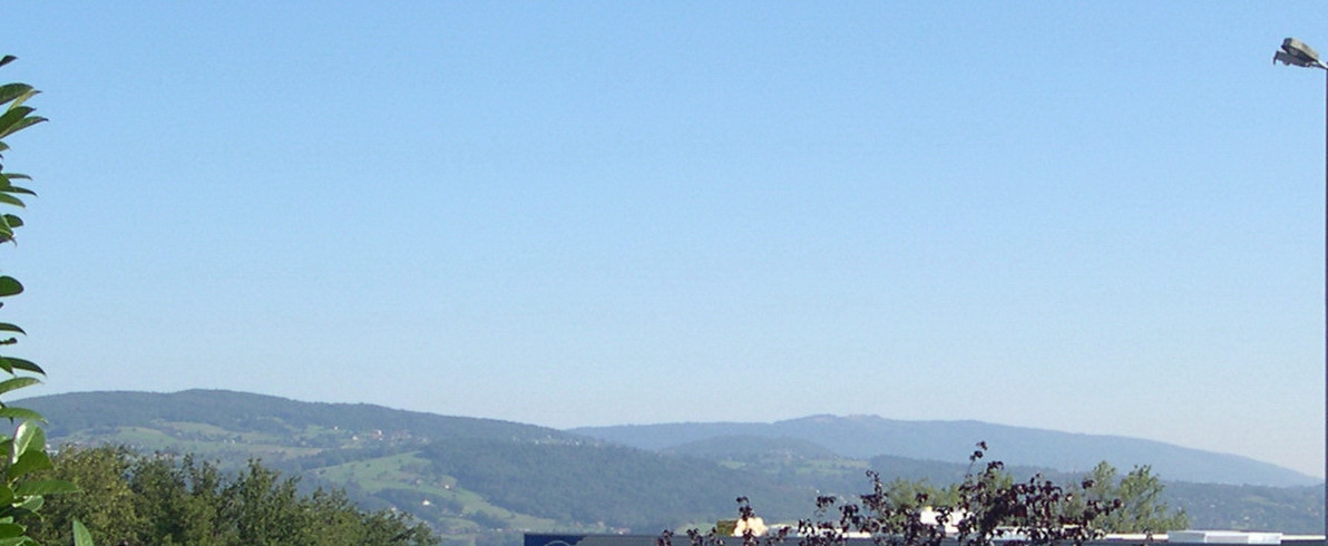 Montagne de (la) Mandellaz (à gauche) en Haute Savoie vue depuis Annecy-Seynod. A droite de l'image le massif du Salève.